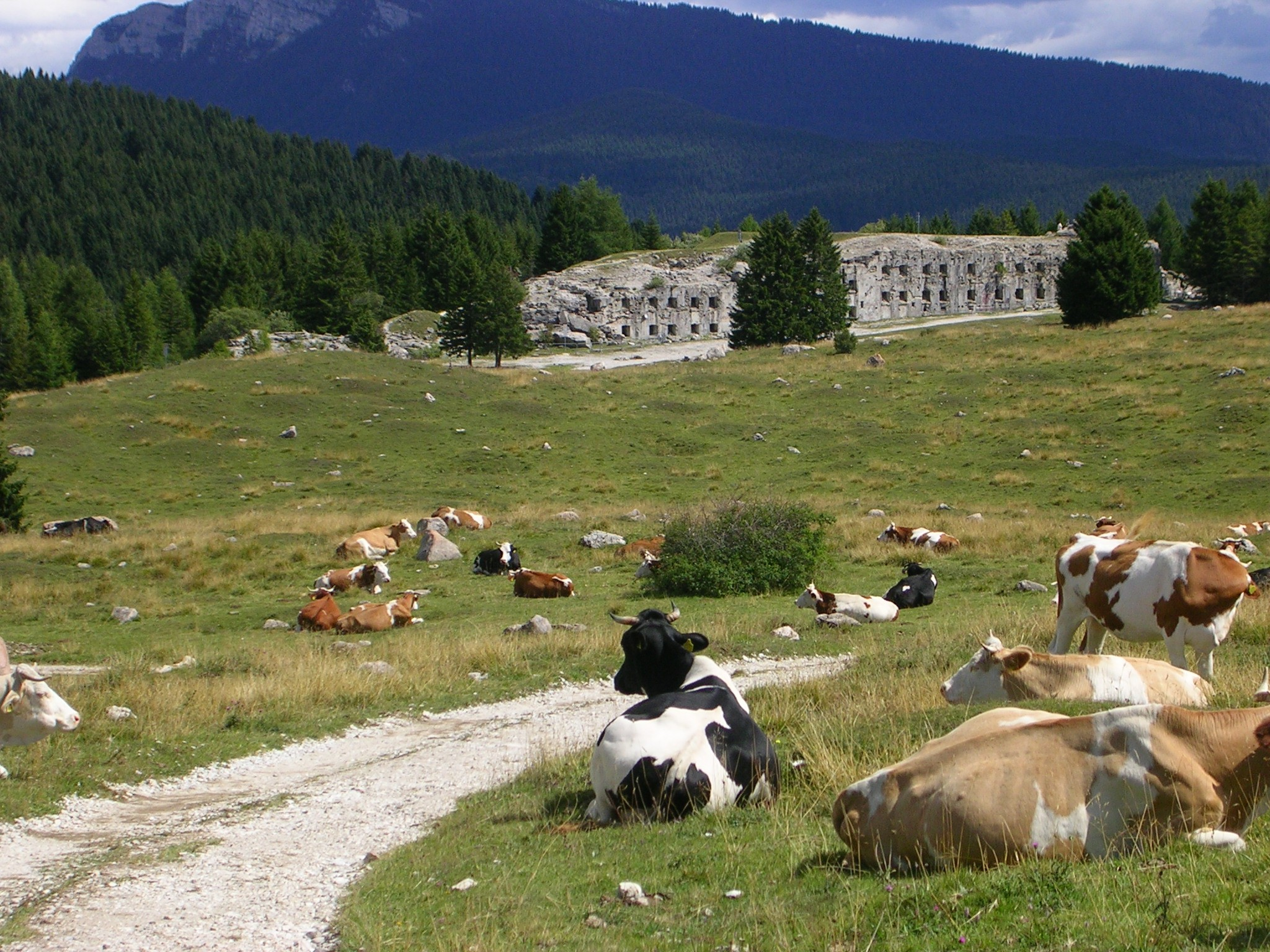 Forte Verle, Passo Vezzena, Italy (Werk Verle)